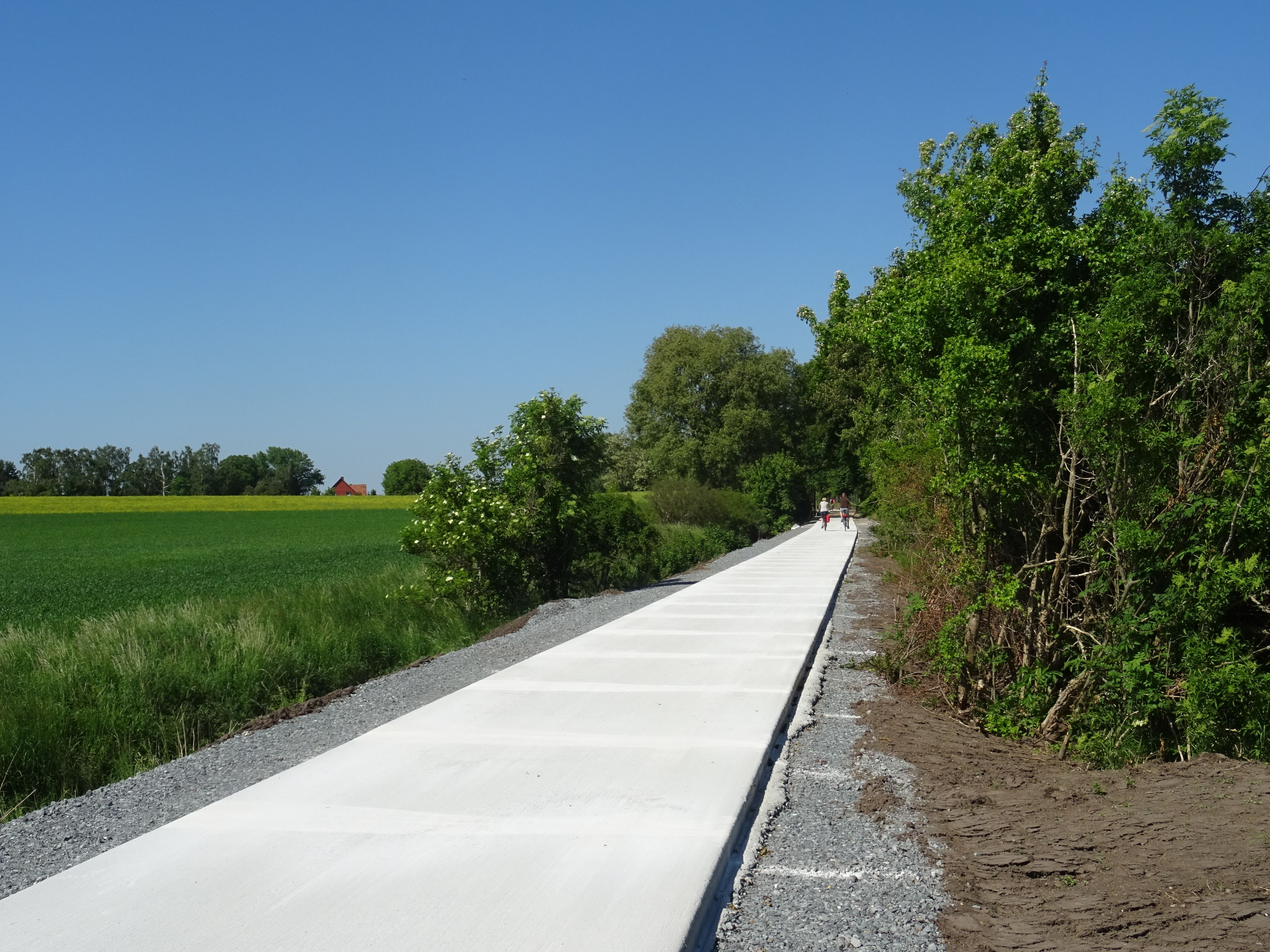 Vogelsdorf, Radweg auf der ehemaligen Bahnstrecke Jerxheim-Nienhagen